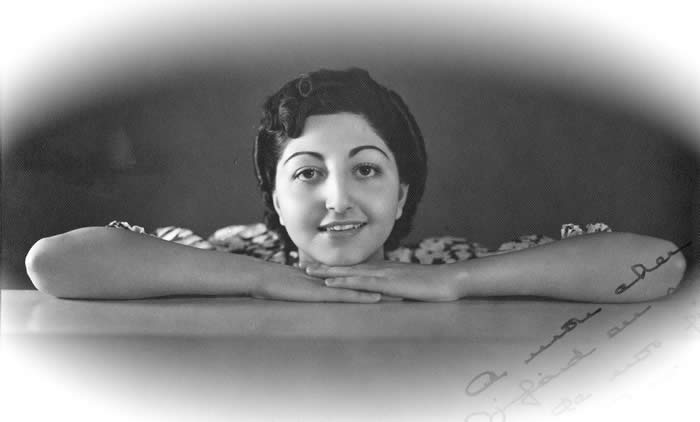 همایوندخت قاجار دختر سوم احمدشاه قاجار